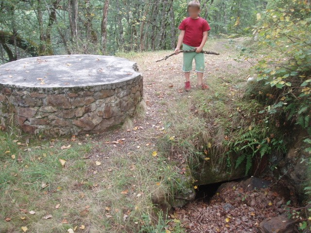 Tourelle de Char Tigre, transformée en table d'orientation à Castelvielh, prés de Luchon